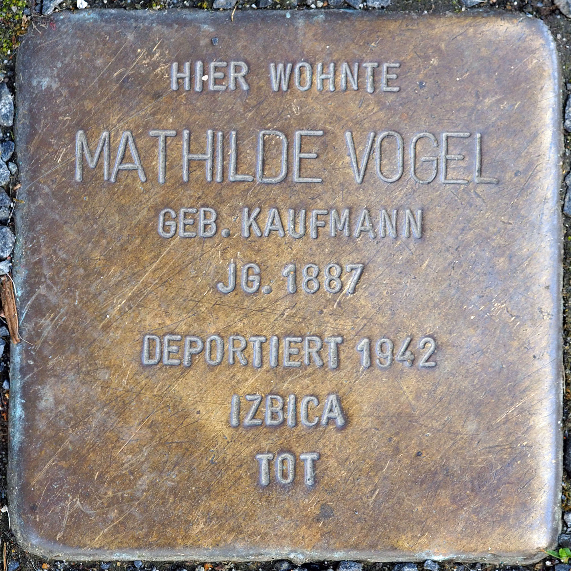 Stolpersteine MG: Vogel, Mathilde